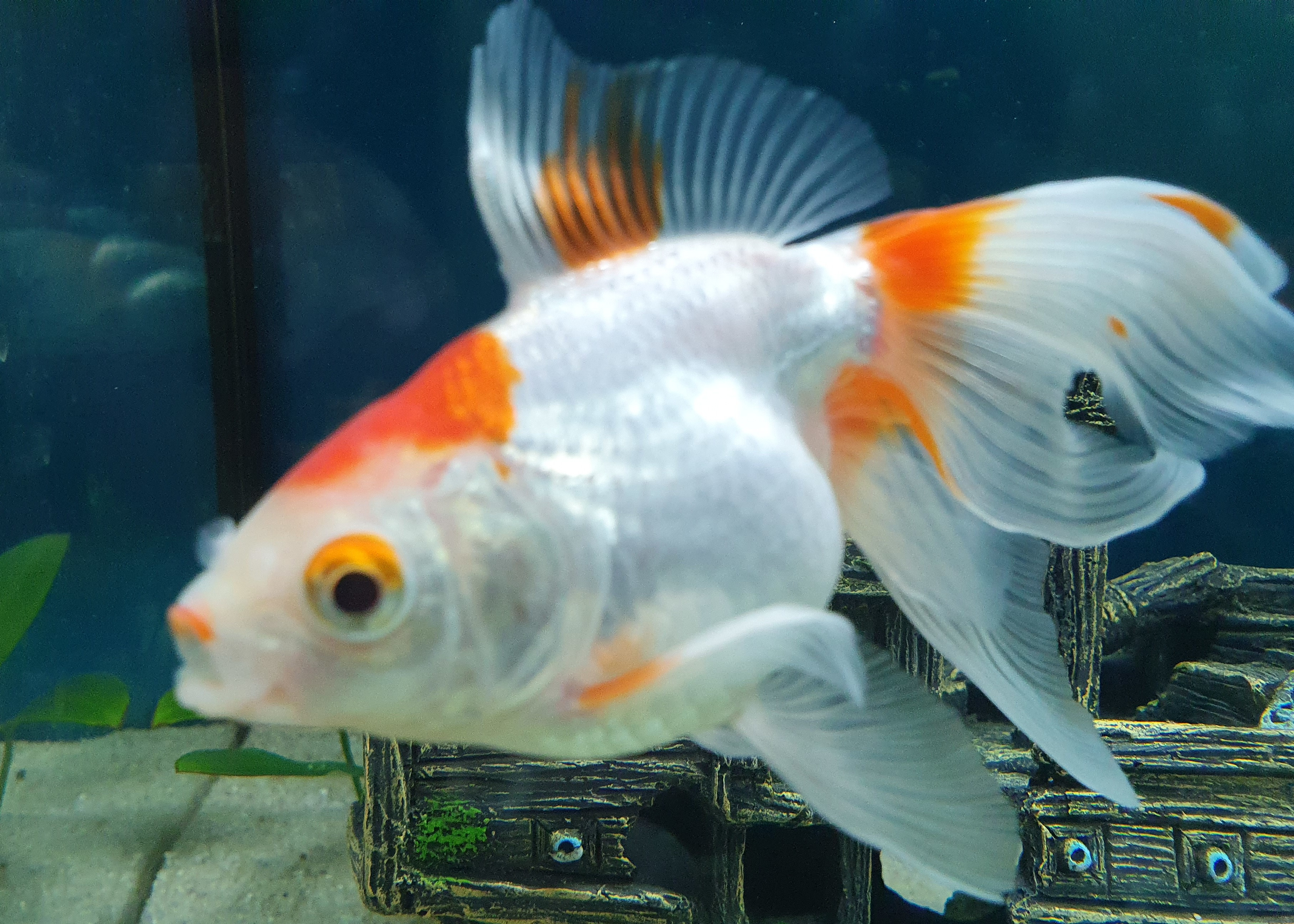 Oranda, varietà di pesce rosso con corpo tondeggiante e doppia pinna